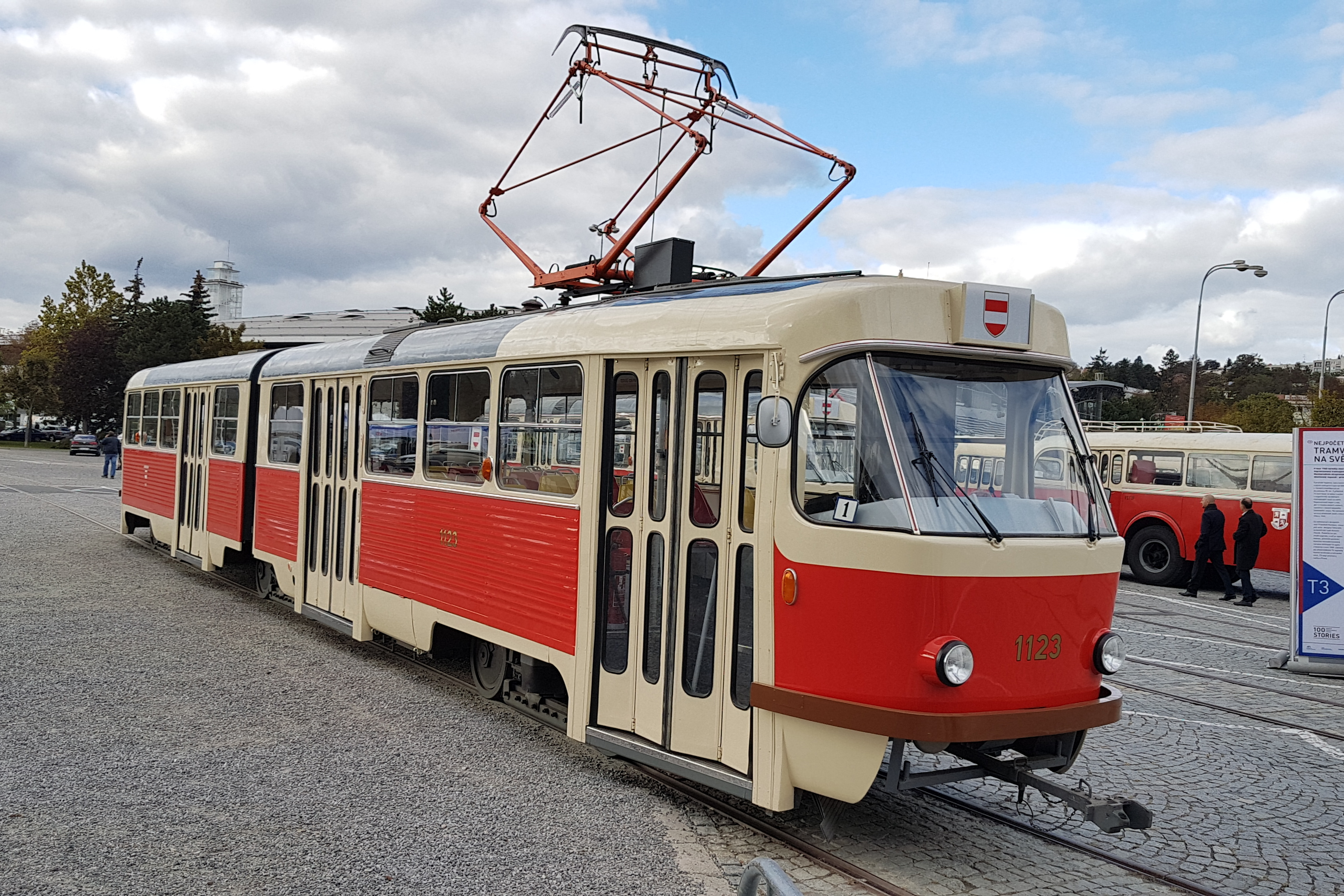 Výstava československého průmyslu 100RIES při MSV 2018 – Tatra K2